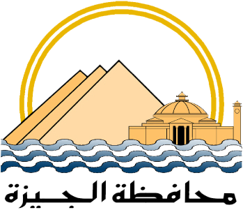 شعار محافظة الجيزة، مصر